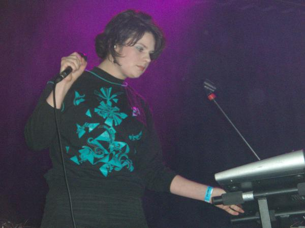 Ema Brabcová v pražském klubu Roxy